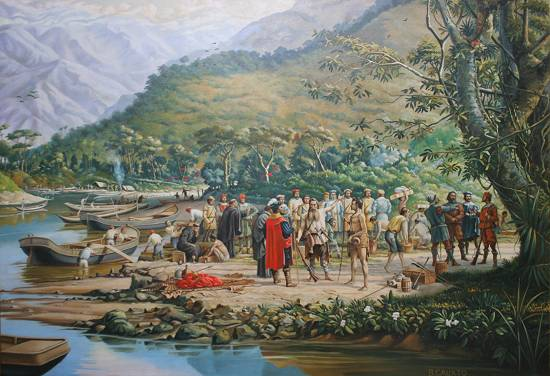 João Ramalho aponta o caminho de Piratininga a Martim Afonso de Souza, c. 1912 Benedito Calixto ( Brasil, 1853-1927)